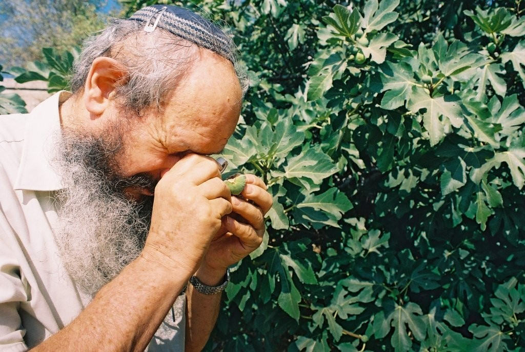 מרדכי כסלו הוא פרופסור אמריטוס לבוטניקה ארכאולוגית באוניברסיטת בר-אילן